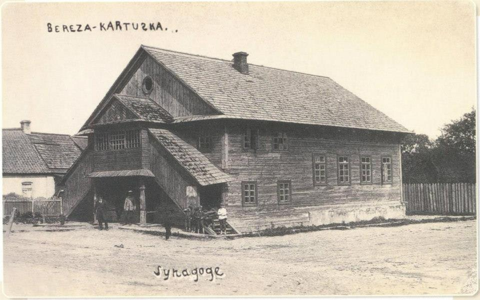 Беларуская (тарашкевіца): Бяроза Картуская (Biaroza Kartuskaja). Сынагога